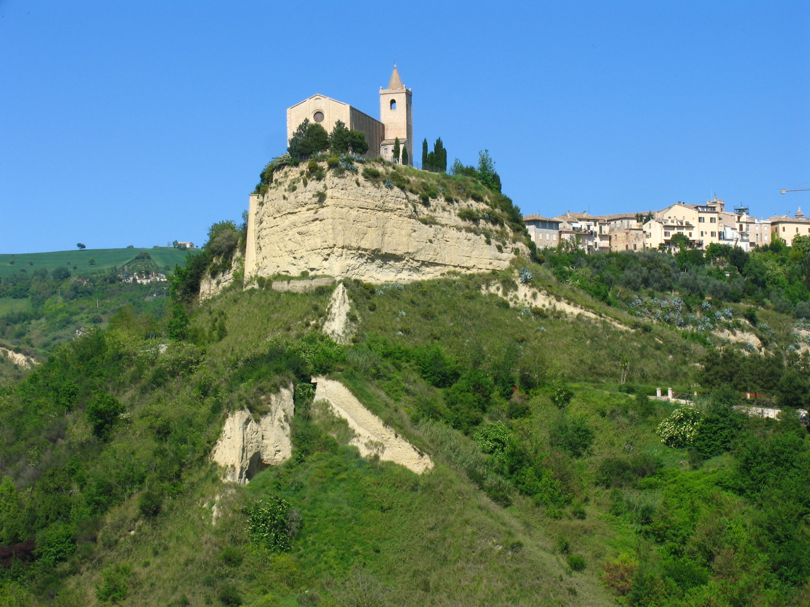 Offida, Marche, Italiamaggio 3. 2006 Offida Chiesa e campagna, Offida Church and landscape